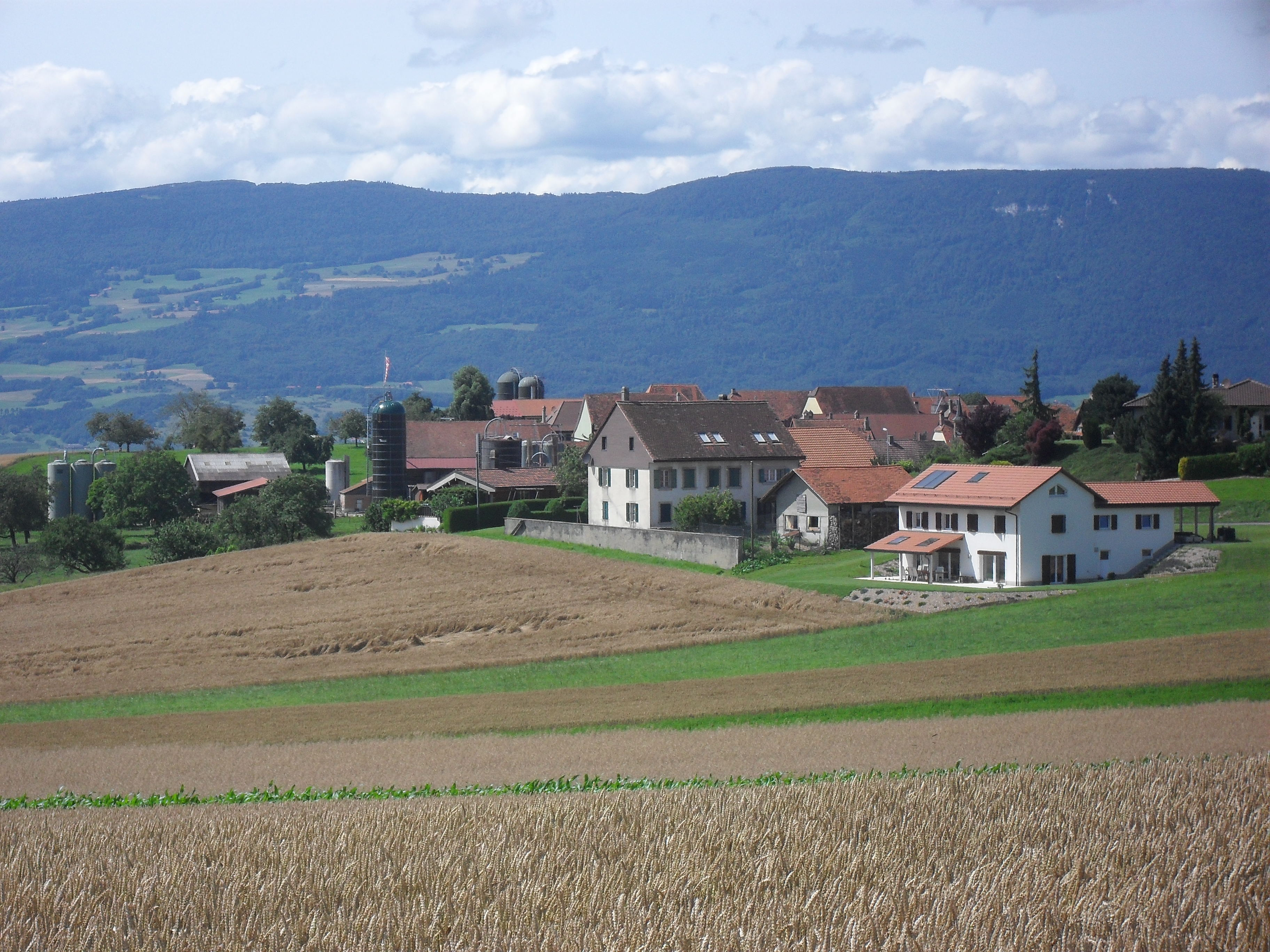 Vue de Rovray